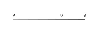 Il·lustració d'una de les proposiciones de les Data d'Euclides